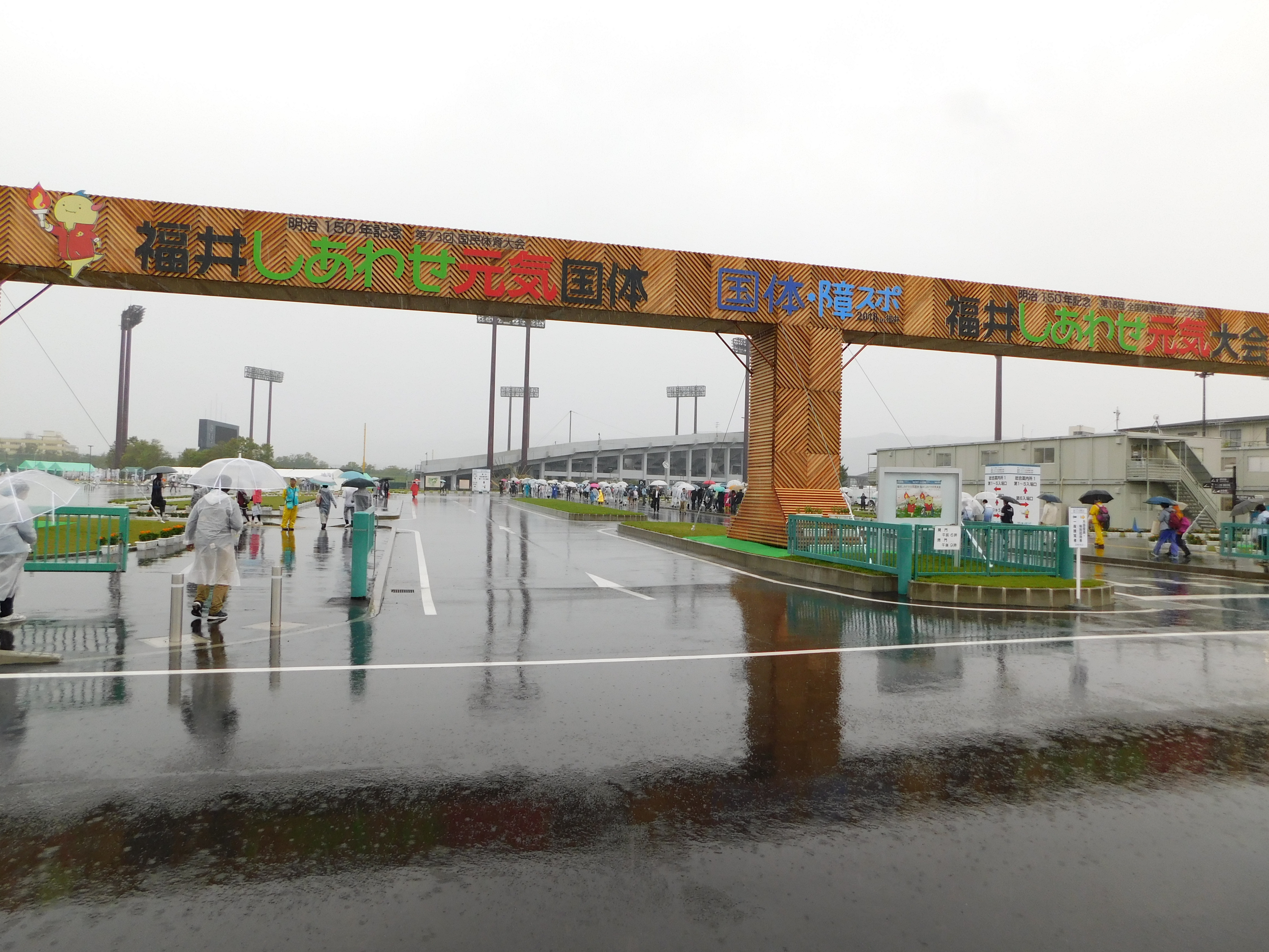 第73回国民体育大会、福井運動公園のメインゲート。